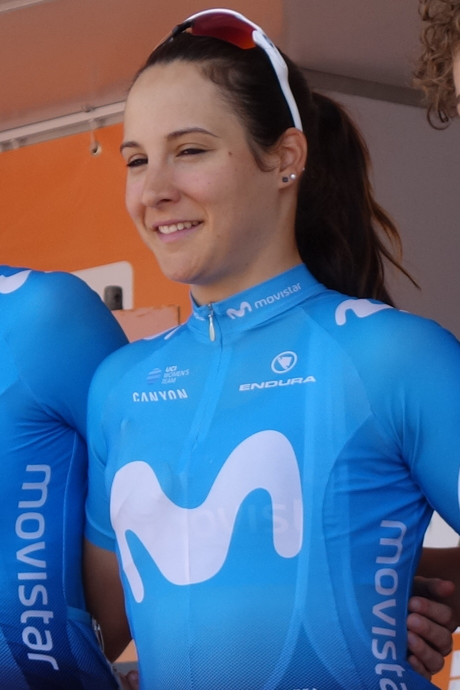 Roxane Fournier (Movistar) bij de start van de eerste etappe van Stramproy naar Weert in de Boels Ladies Tour 2019